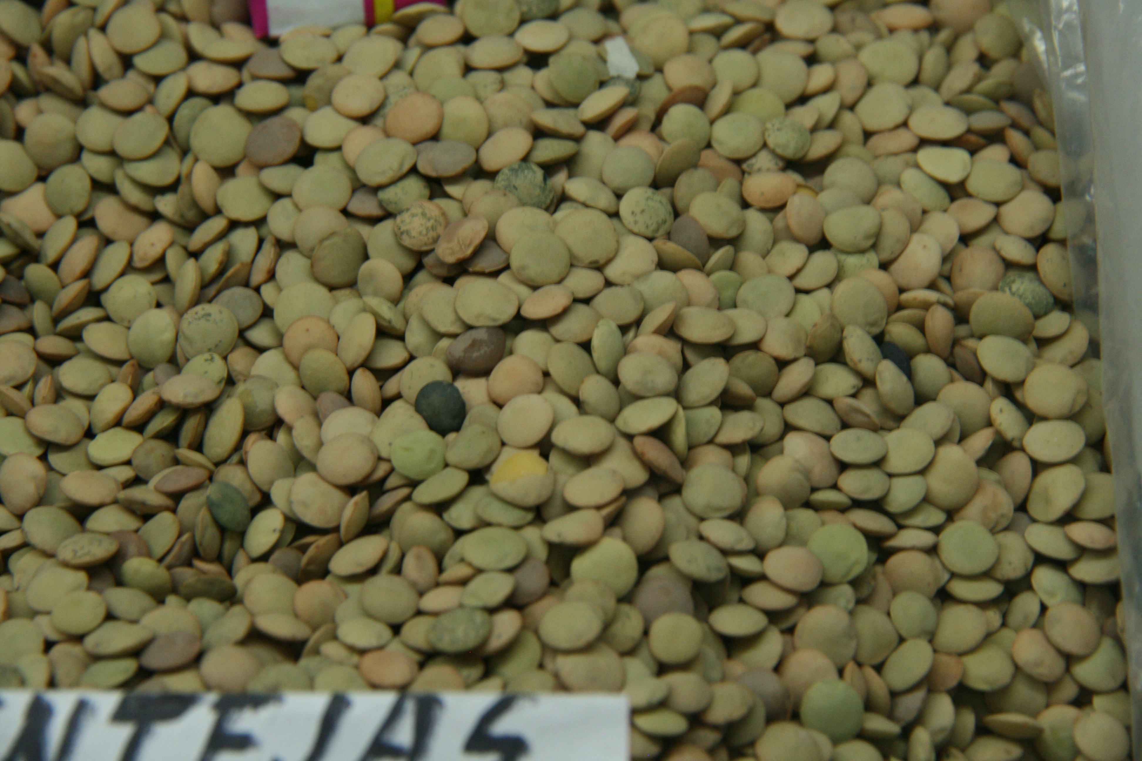 Lentejas Salamanca